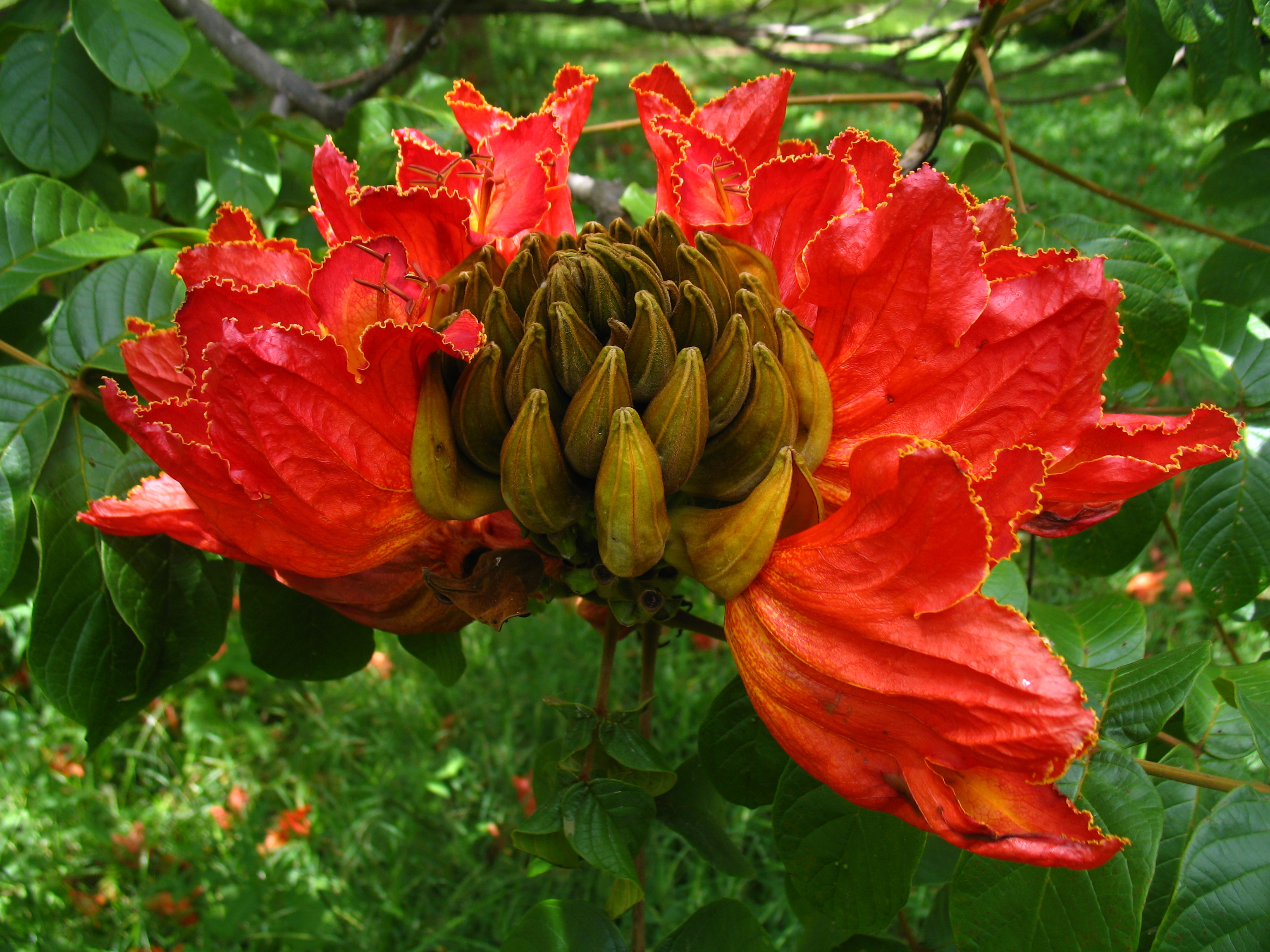 Spathodea campanulata